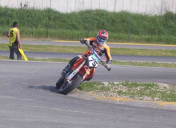 Boris Chambon Geim GP Europa 2005 in Casteletto di Branduzzo (PV)